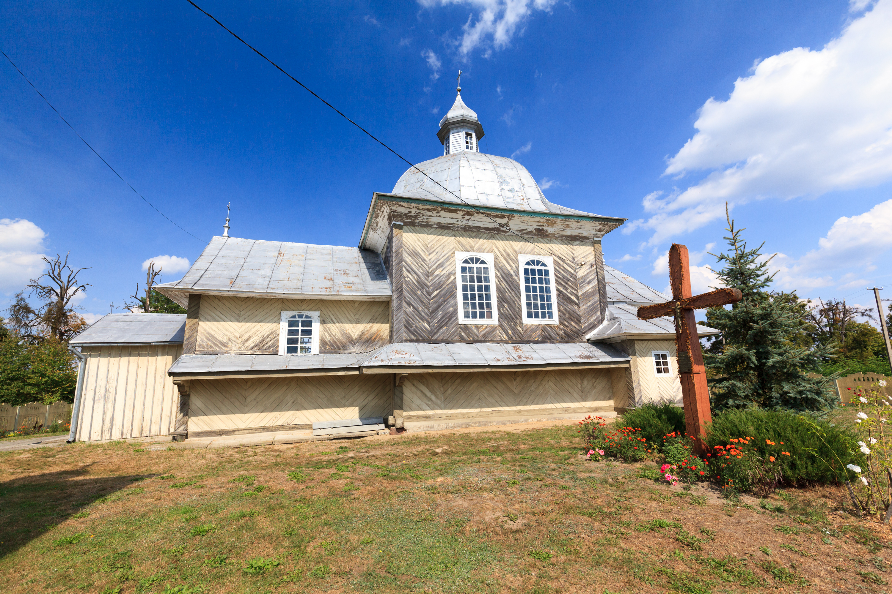 Церква Успення Пресвятої Богородиці(дер.), с.Липовець